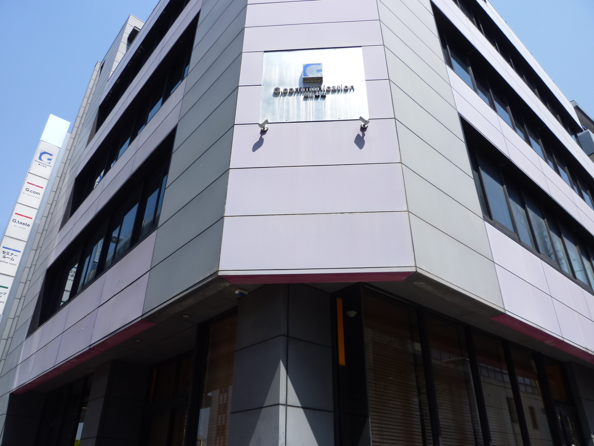 G.comunication head office